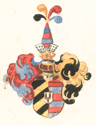 Blason de 1663